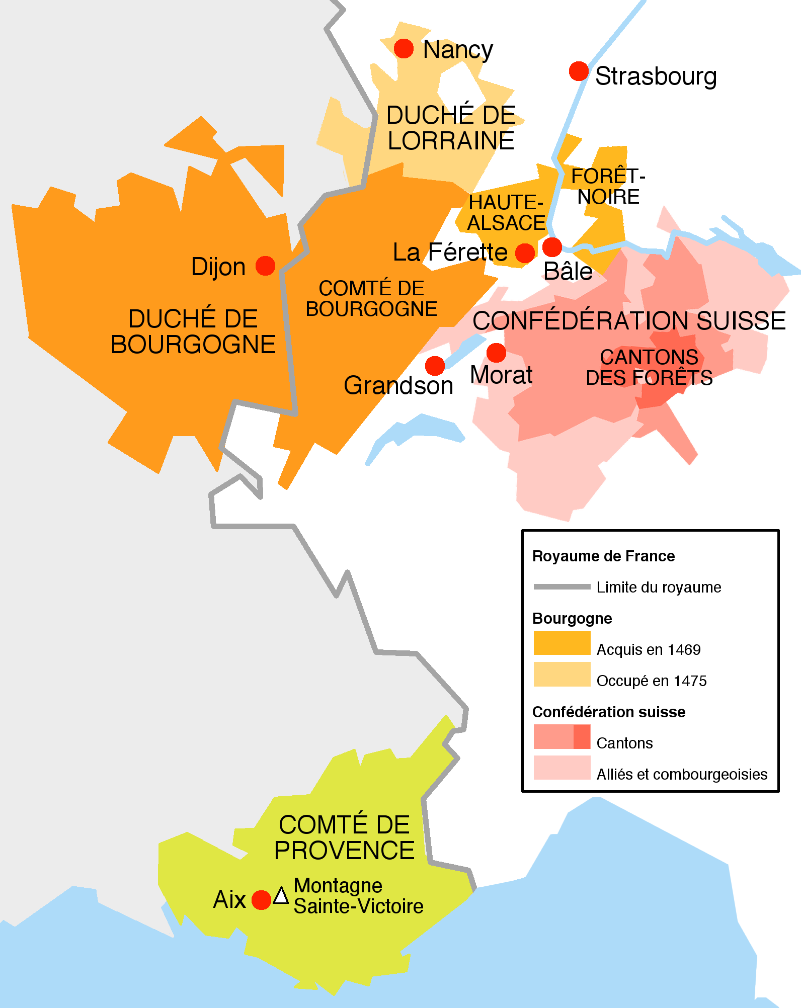 Lieux du roman de Walter Scott Anne de Geierstein, qui se passe au temps des guerres de Bourgogne, de 1474 à 1477. Croquis très simplifié. Je me suis inspiré de manière approximative des fichiers Commons Map France 1477-fr.svg de Zigeuner, Struktur Eidgenossenschaft 1474-fr.svg de Sémhur, Karte-Haus-Burgund 4-FR.png de Sidonius et Italy location map satellite.jpg de M.casanova.